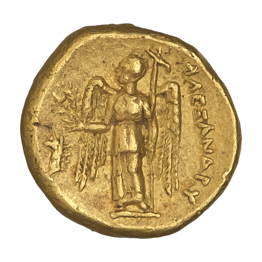 Македонское царство. Сарды. Александр III Великий (336—323 гг. до н.э.). Прижизненная чеканка. ¼ статера. Ок. 334—323 гг. до н.э. Реверс. Надпись AΛEΞAΝΔPOY. Фигура Ники, влево; в правой руке венок, в левой — стилис (мачта корабля). Слева на поле голова грифона, влево.